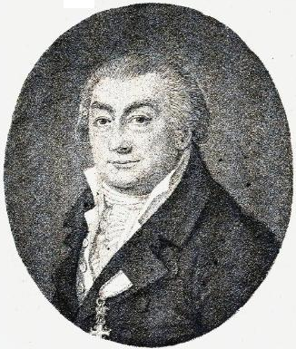 Jacob Rosted, rektor ved Christiania Kathedralskole.